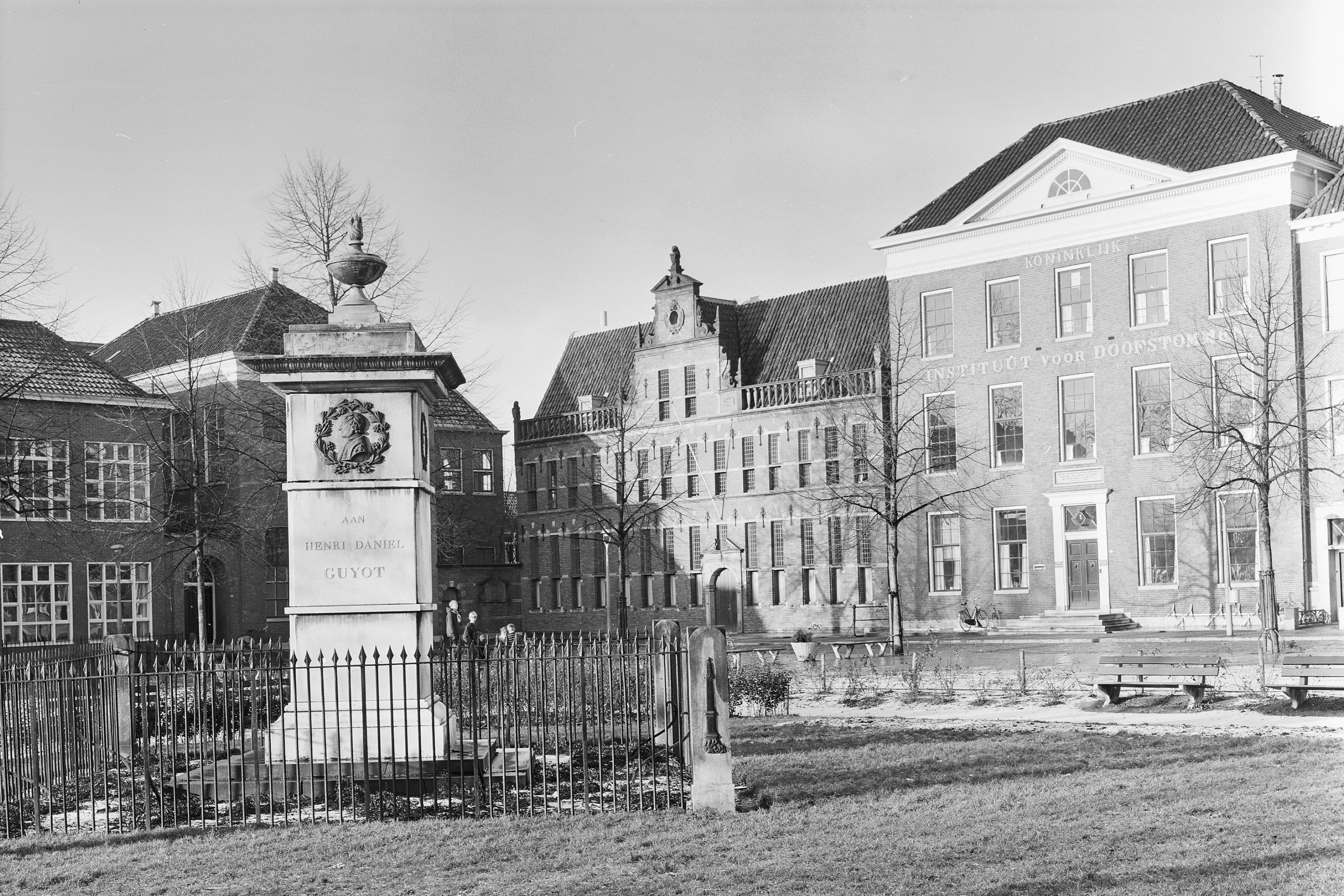 Het Guyotplein in Groningen, 1967. Links het Guyotmonument (rm 18478). Op de achtergrond in het midden Guyotplein 3 (rm 18477) en rechts Guyotplein 2 (rm 18476), die beide deel uitmaakten van het voormalige Koninklijke Instituut voor Doofstommen.